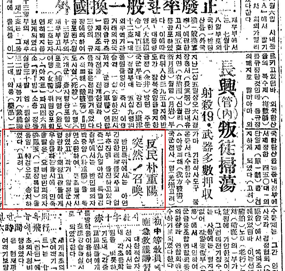 박중양 반민특위 재소환 보도문 - 대중일보 1949년 07월 30일자, 2면